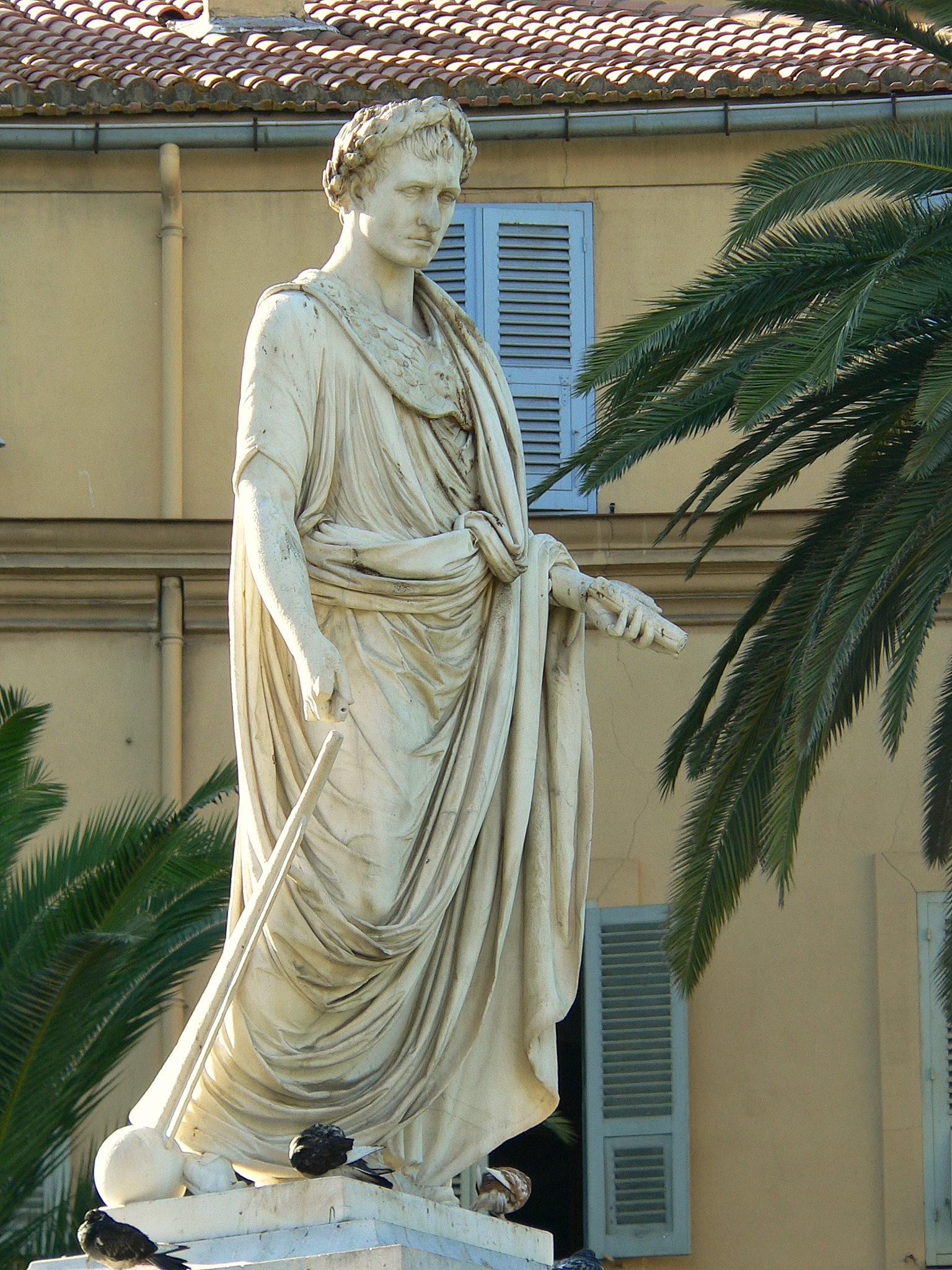 Statue de Napoléon Bonaparte représenté en premier consul. Cette statue en marbre blanc du sculpteur italien Francesco Massimiliano Laboureur, a été commandée par le Cardinal Fesch. Inaugurée le 5 mai 1850, elle domine la fontaine en granit, dite Fontaine des quatre lions de Jérôme Maglioli. Place Foch (toujours appelée par les Ajacciens Place des Palmiers) Ajaccio